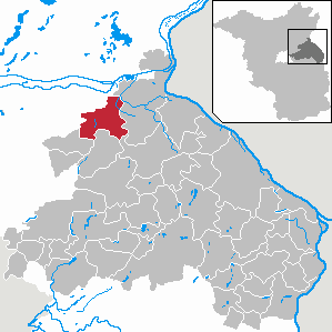 Falkenberg in Brandenburg (Country) - District Märkisch-Oderland